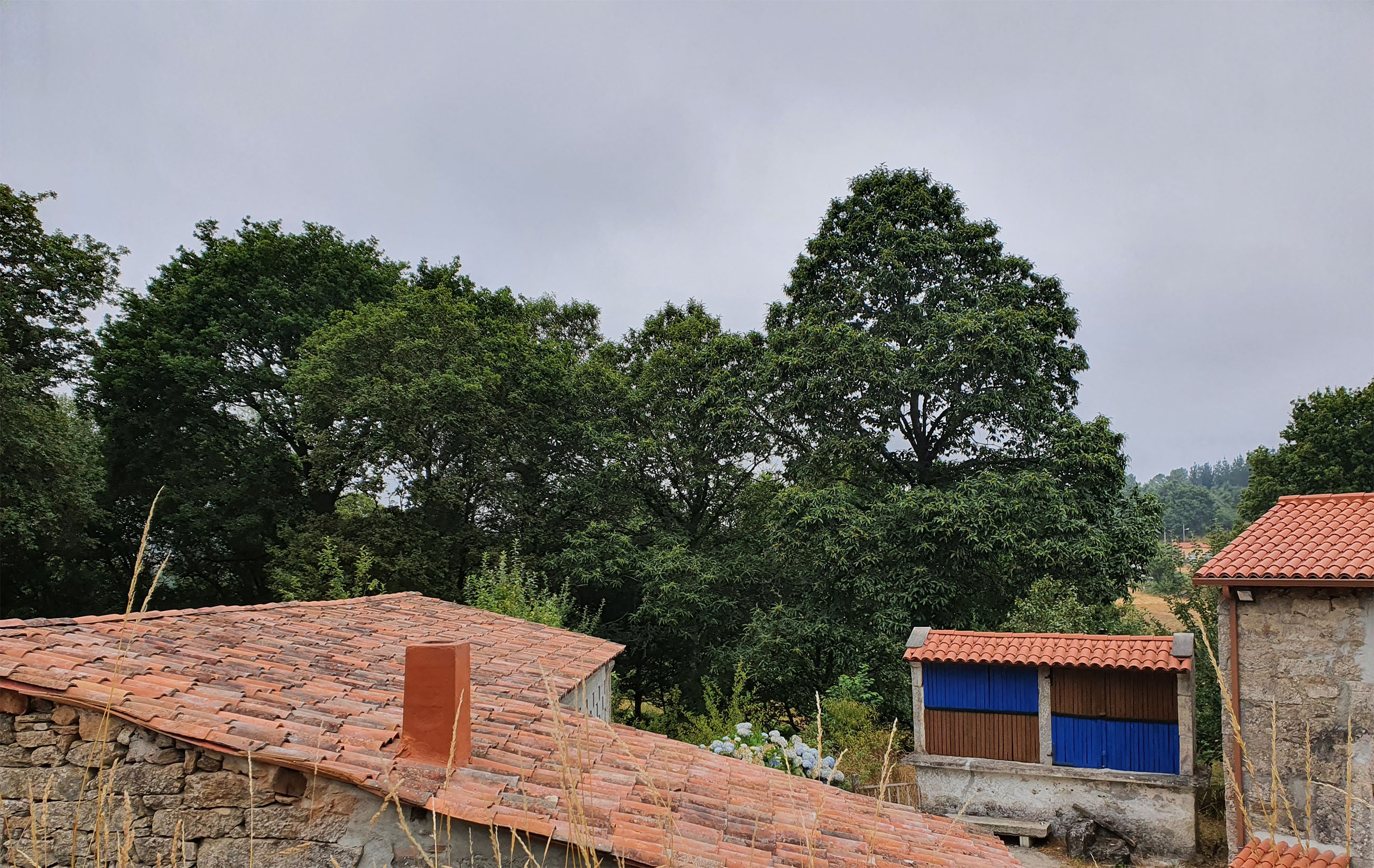 A Costa, na parroquia da Cervela, Concello de Antas de Ulla. Situada nunha zona encostada entre os enclaves de Bertosende, O Pazo e o propio núcleo da Cervela, conta unicamente con dúas vivendas.